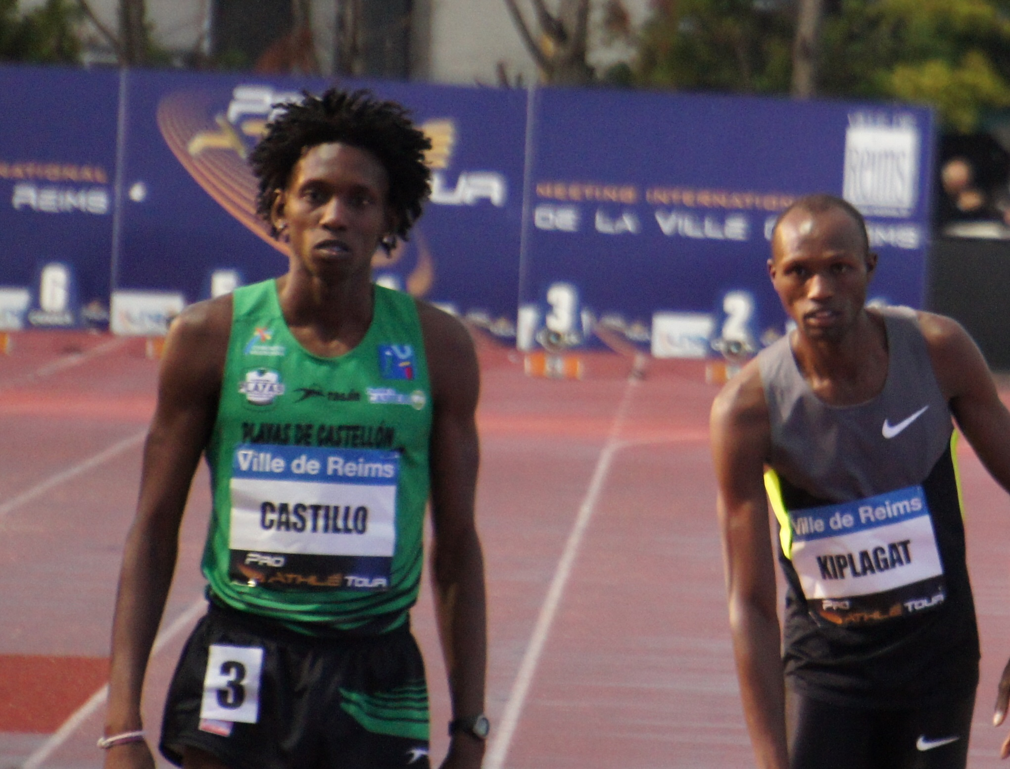 Maurys Surel Castillo et Abraham Kiplagat lors des rencontres d'athlétisme de Reims 2013.